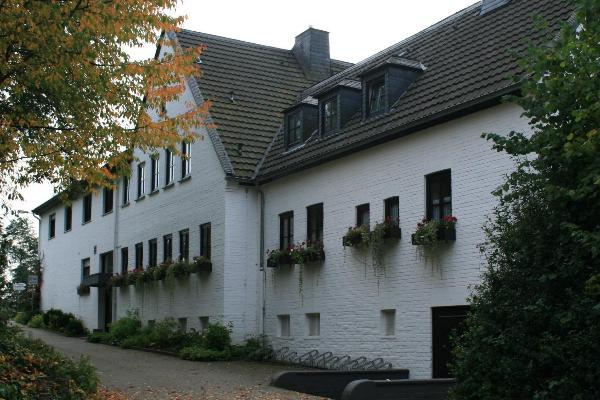 Haus St. Georg in Wegberg-Watern